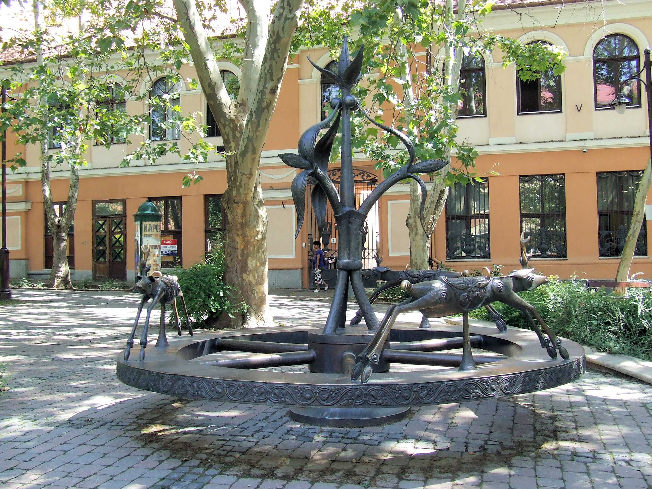 Bors István (*1938) Munkácsy-díjas kaposvári szobrászművész Napkerék című alkotása a kaposvári Európa parkban (2000)